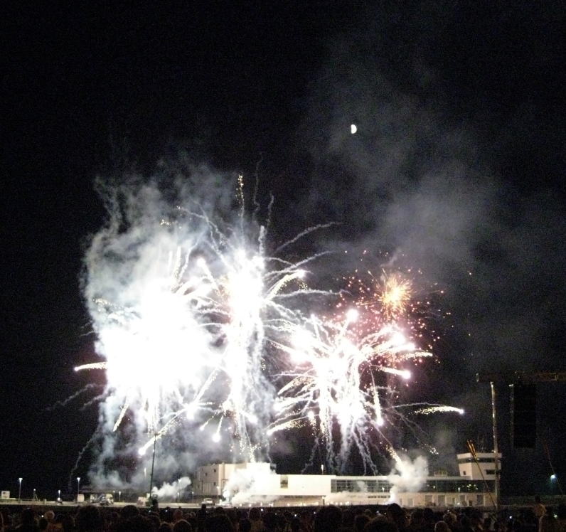 Riječke ljetne noći 2009. godine